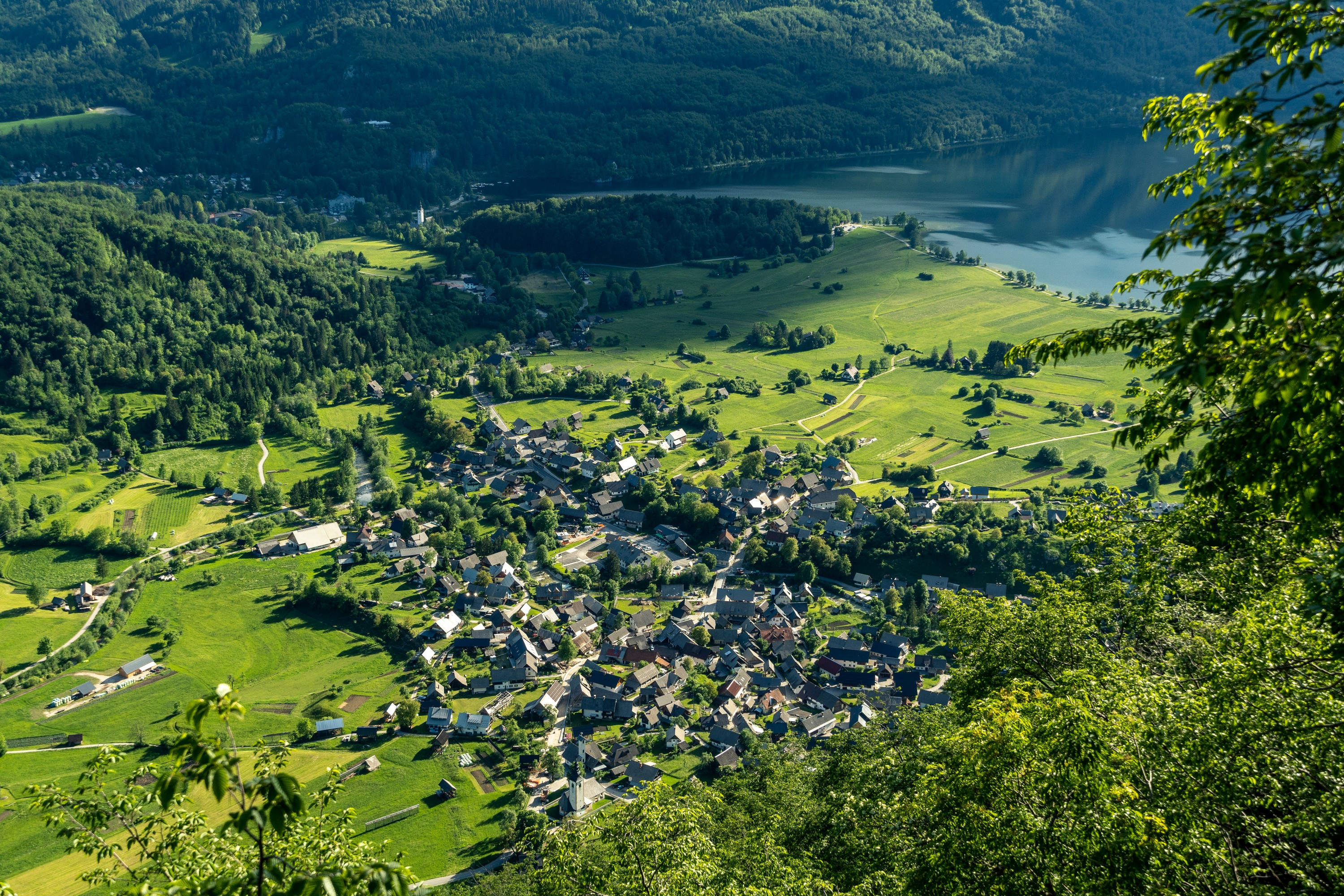 Pogled na Staro Fužino iz vzpetine Studor